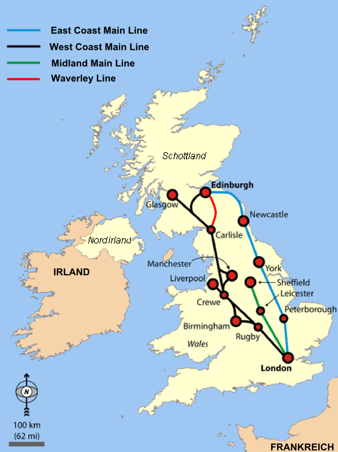 Einfache Ubersichtskarte der WCML, ECML, Midland Minline und Waverley Line.